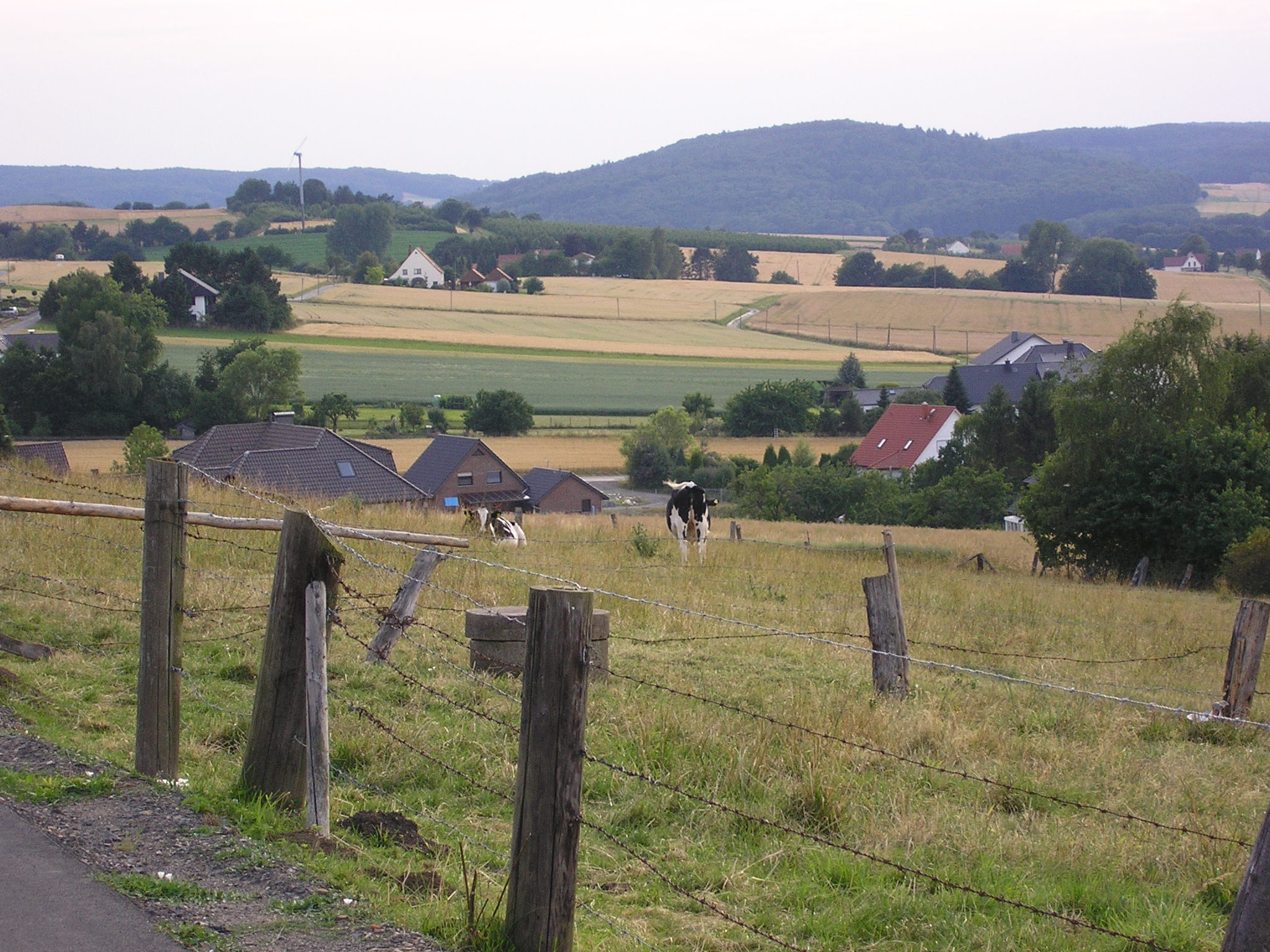 Ortsrand von Obermehnen, Lübbecke